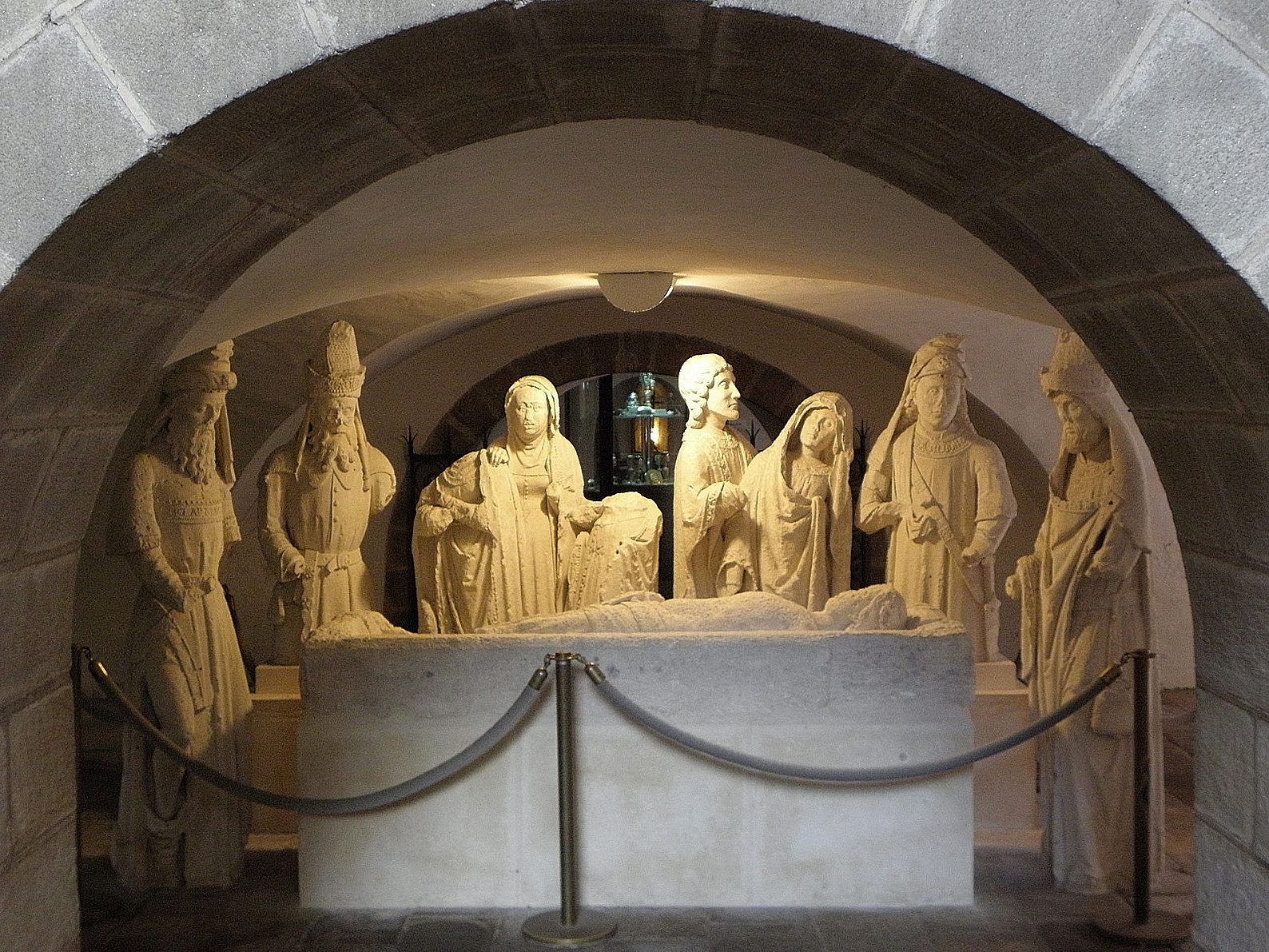 Mise au tombeau de l'abbatiale Sainte-Croix de Quimperlé (29).